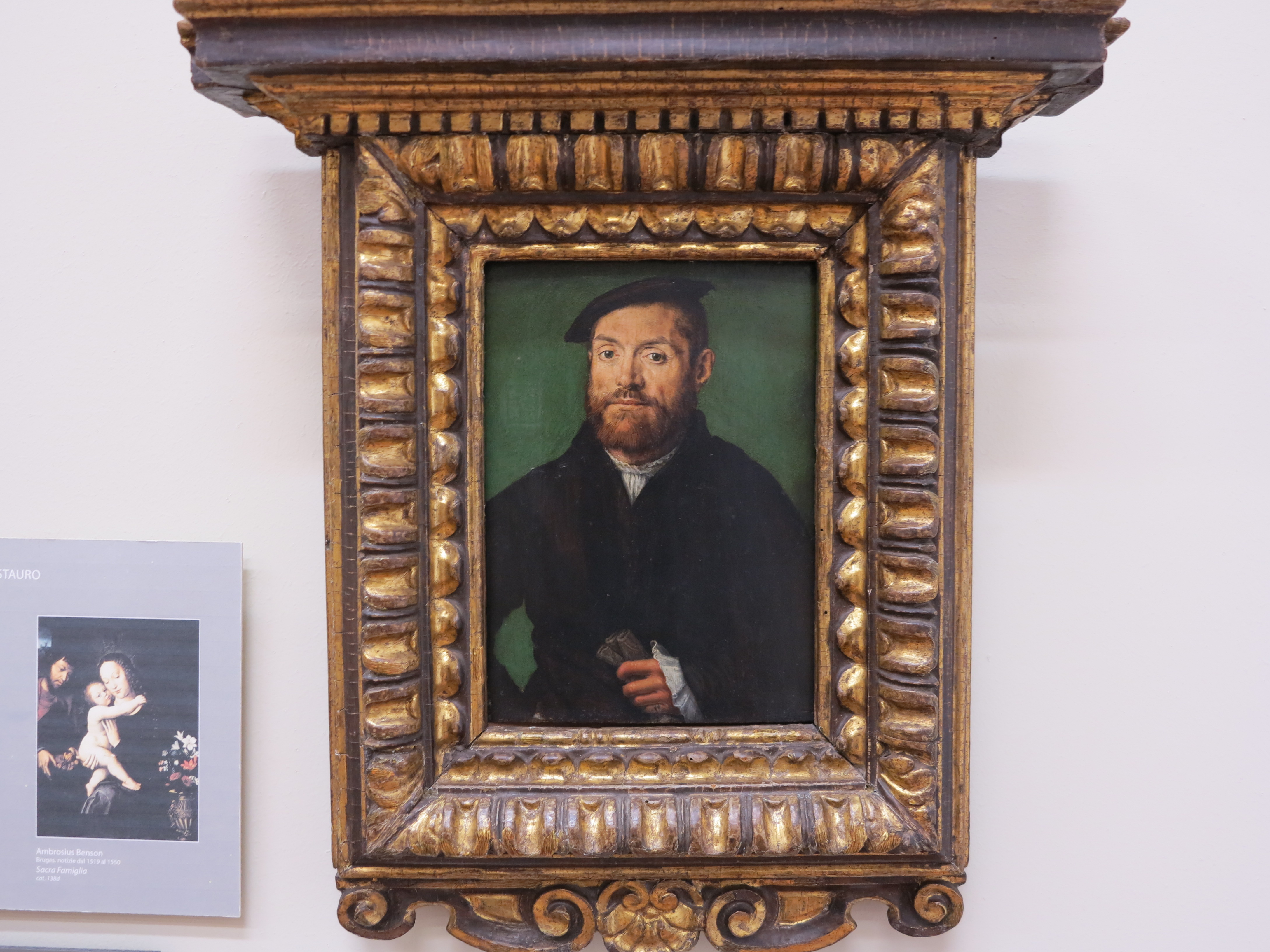 Galleria G. Franchetti alla Ca' d'Oro - MIBAC This is a photo of a monument which is part of cultural heritage of Italy.